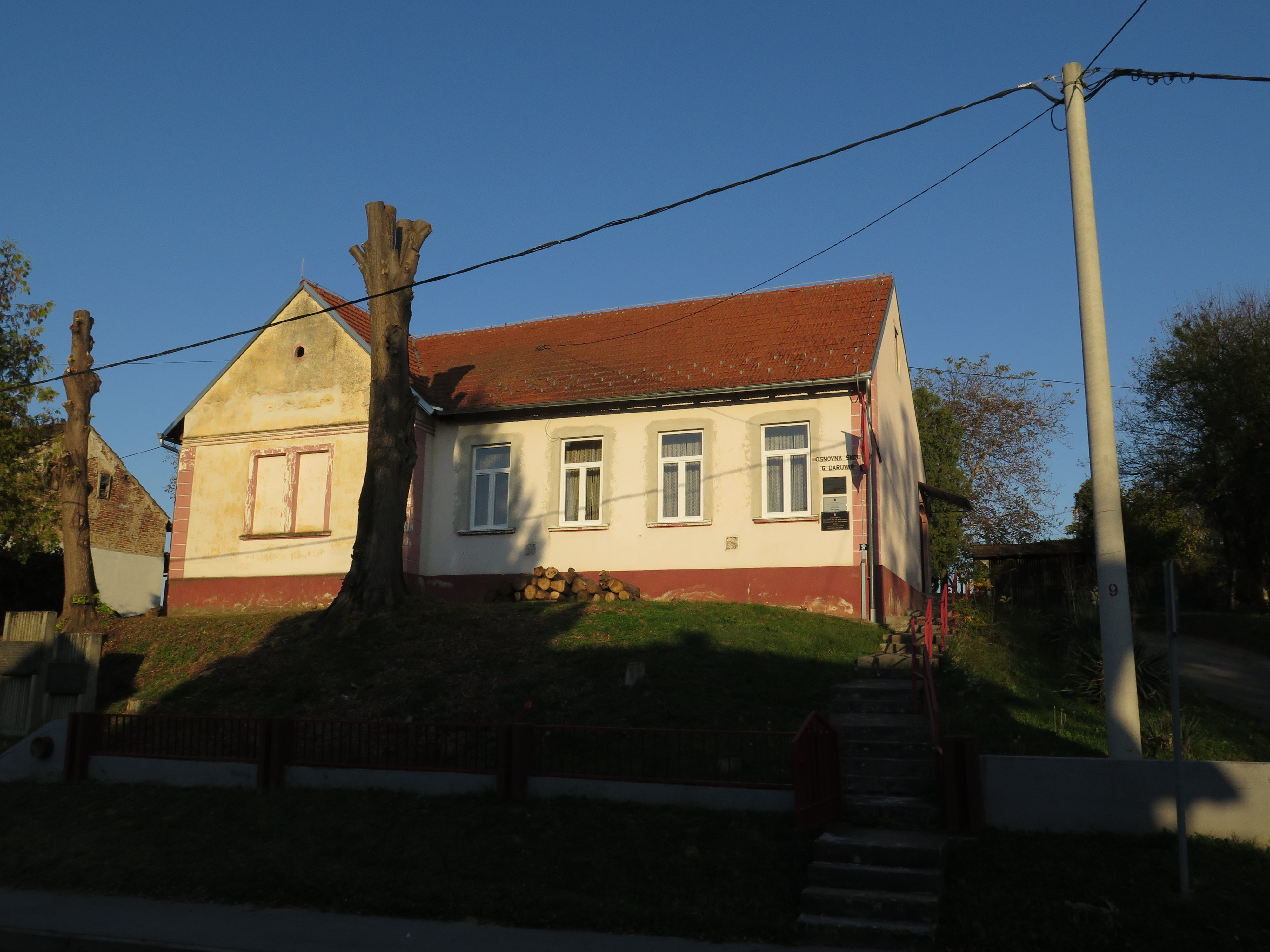 Škola v Horním Daruvaru